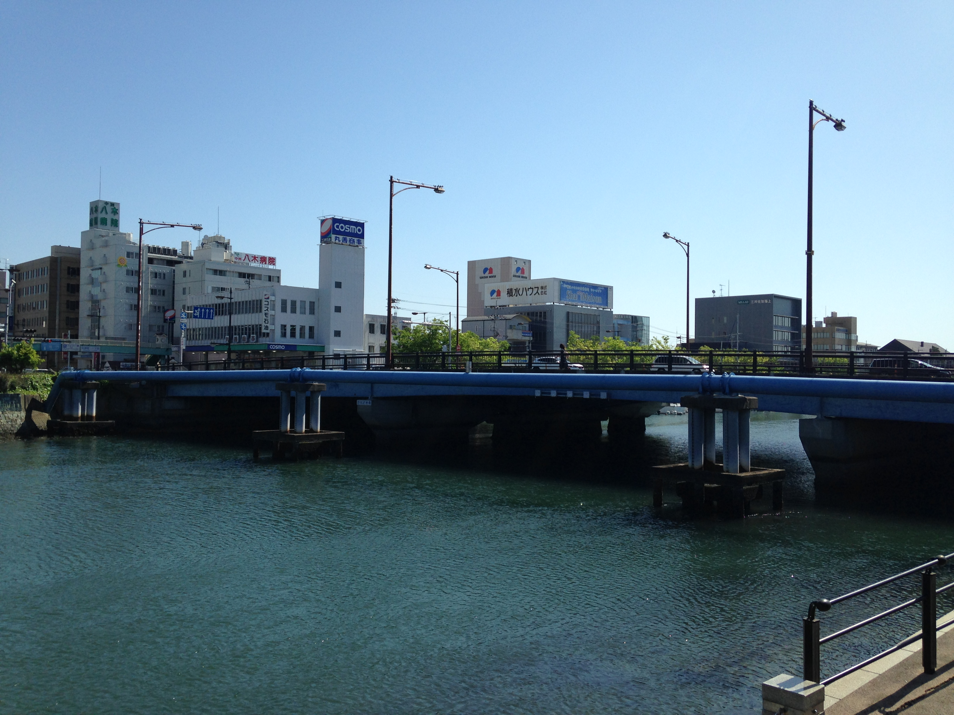 新町川に架かるかちどき橋